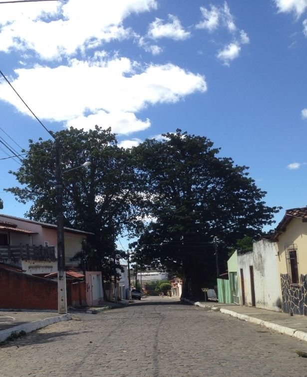 Os dois exemplares de Baobá em Itaberaba na Bahia.